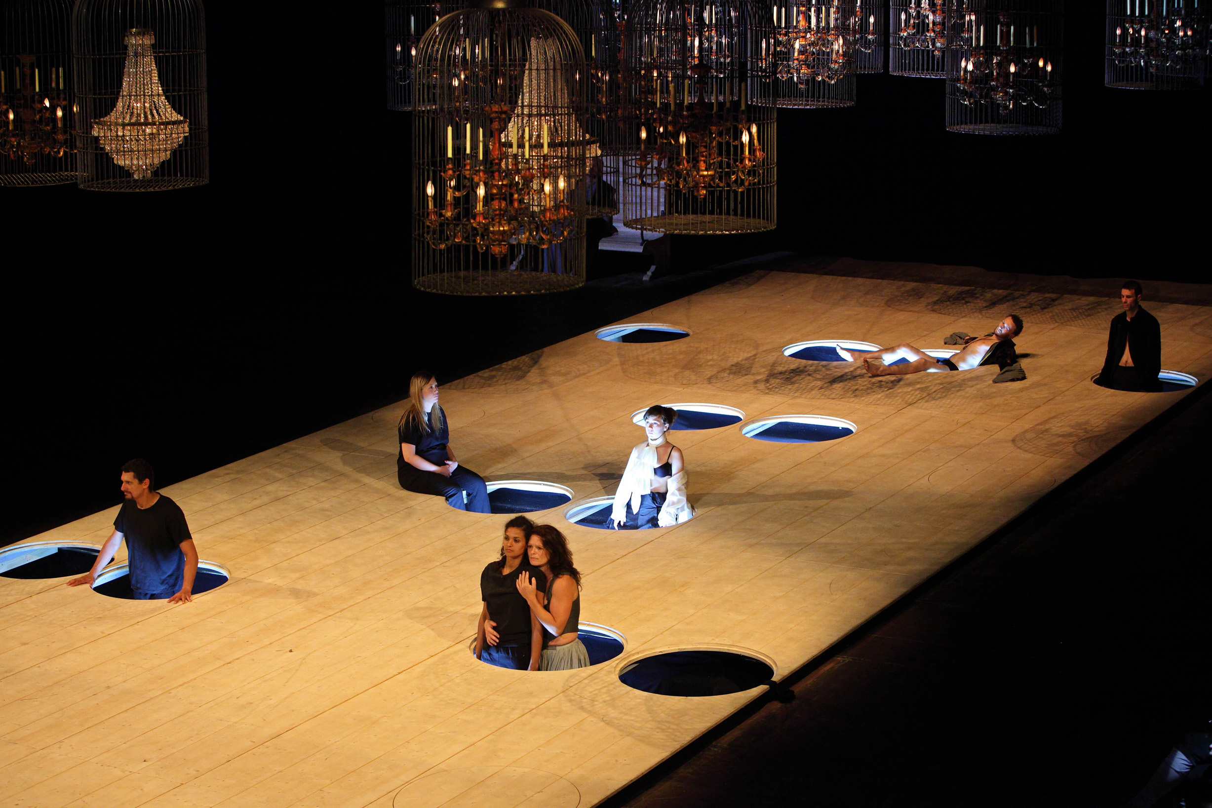 Trilogia della Villeggiatura di Carlo Goldoni adattamento Letizia Russo, Antonio Latella regia di Antonio Latella produzione Schauspiel Koln riallestimento commissionato da Napoli Teatro Festival Italia Prima nazionale Lingua tedesca, italiana (con sopratitoli in italiano) 13, 14 giugno (ore 19.00) durata 280' Teatro di San Carlo